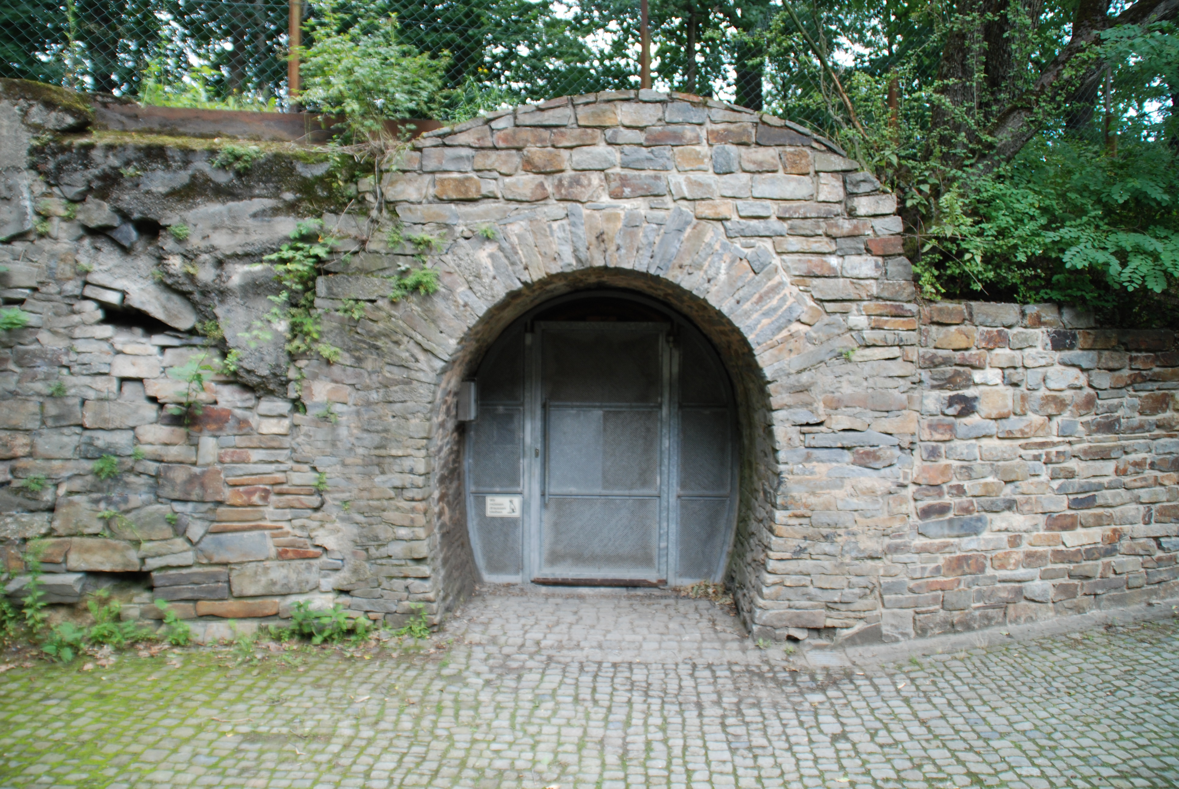 Hasestollen am 25.7.2008